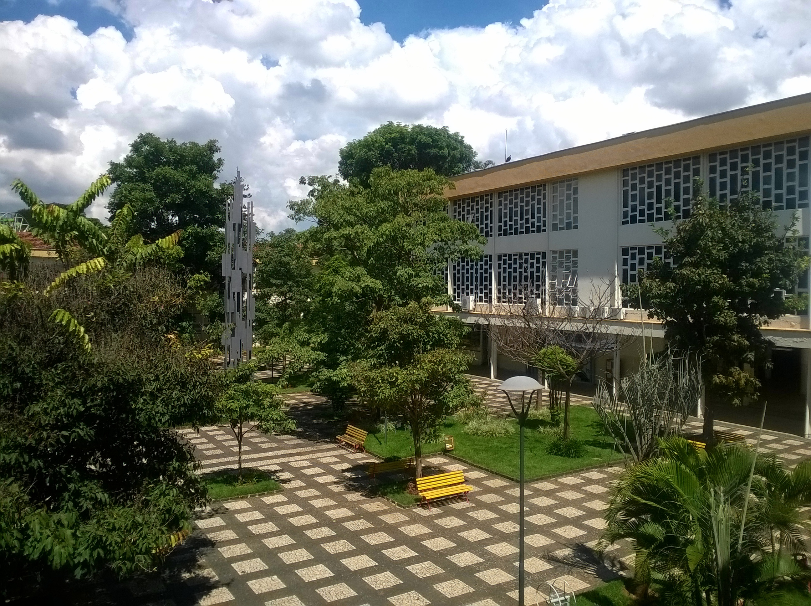 Parte interna do câmpus Goiânia do Instituto Federal de Educação, Ciência e Tecnologia de Goiás, em abril de 2015. Pátio da instituição.